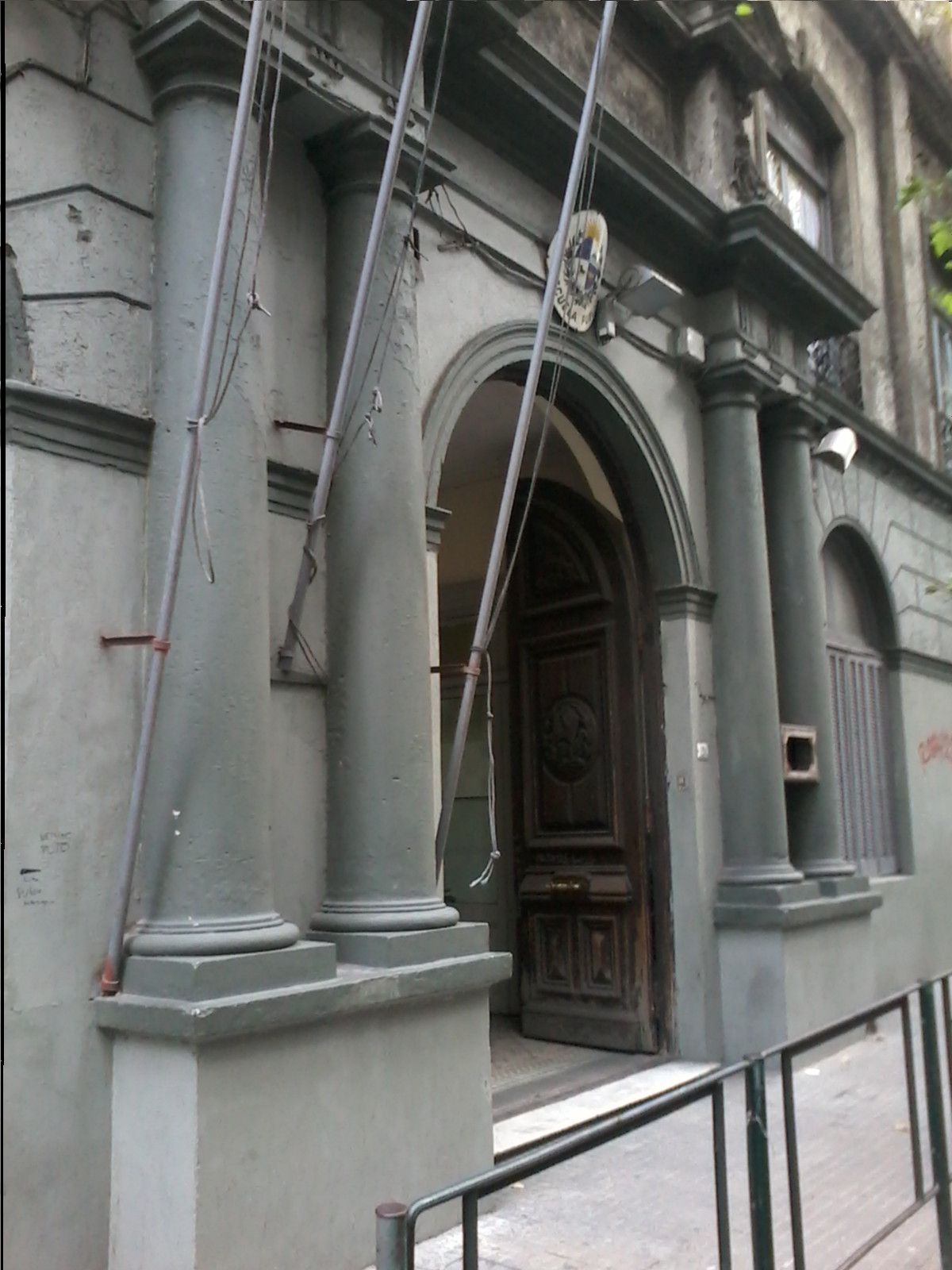 Escuela N° 2 Argentina. Ubicacion: calle Colonia 1194 y calle Cuareim. Centro. Montevideo. Uruguay